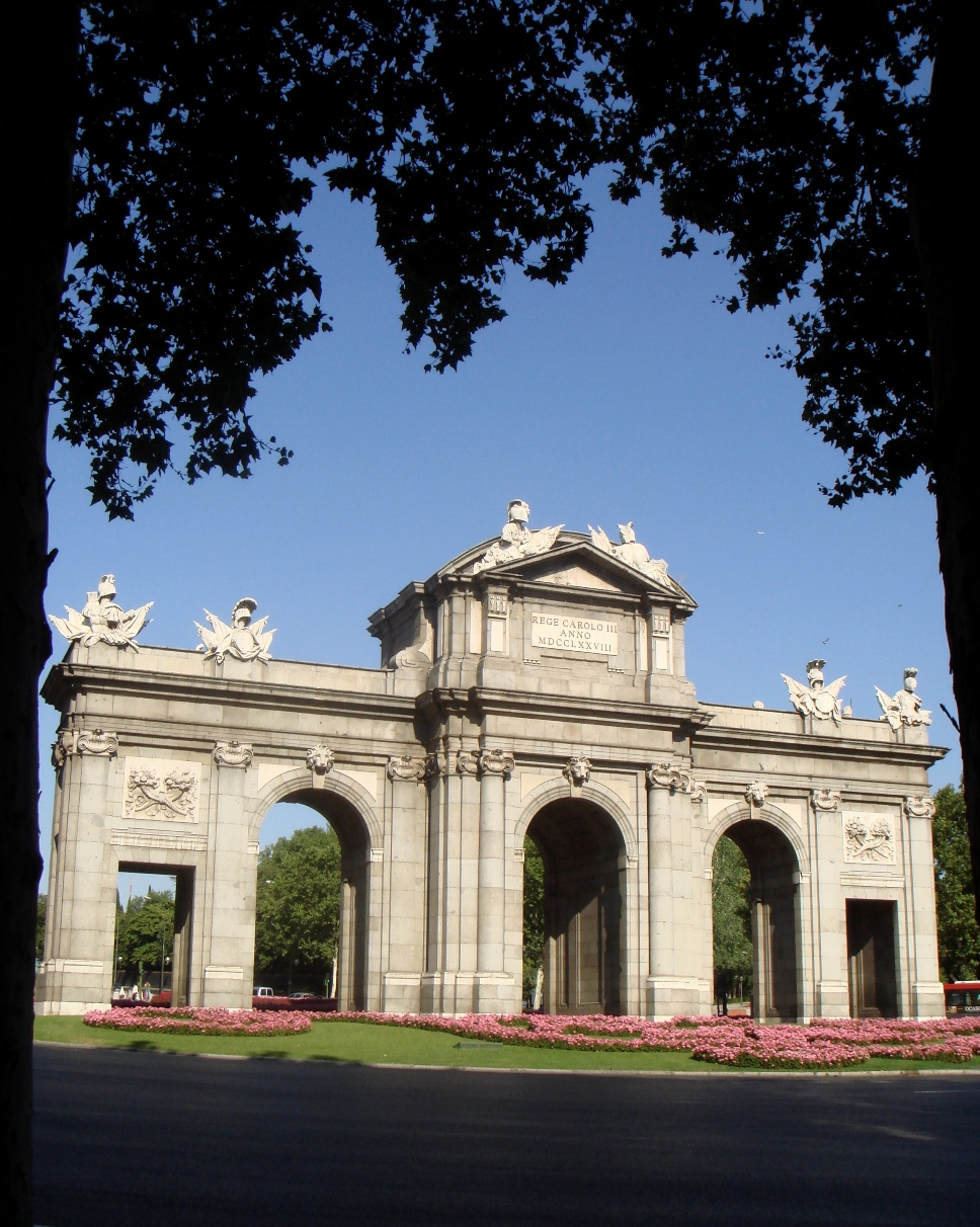 Puerta de Alcalá, obra de Francesco Sabatini; Madrid.